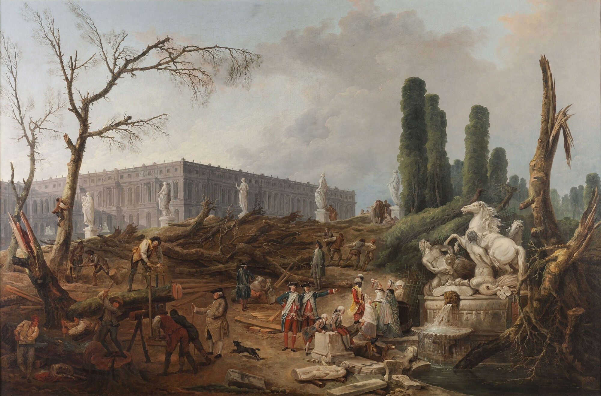 Tableau exposé au salon de 1777 avec une semblable nommée "vues des jardins de Versailles, dans le temps qu'on abattait les arbres". Œuvre commandée par Louis XVI en 1775 pour célébrer les grands travaux réalisés cette année dans le parc. Dimensions : 128 x 192 cm. Cadre: 148 x 212 x 8 cm. Matière et technique : huile sur toile.